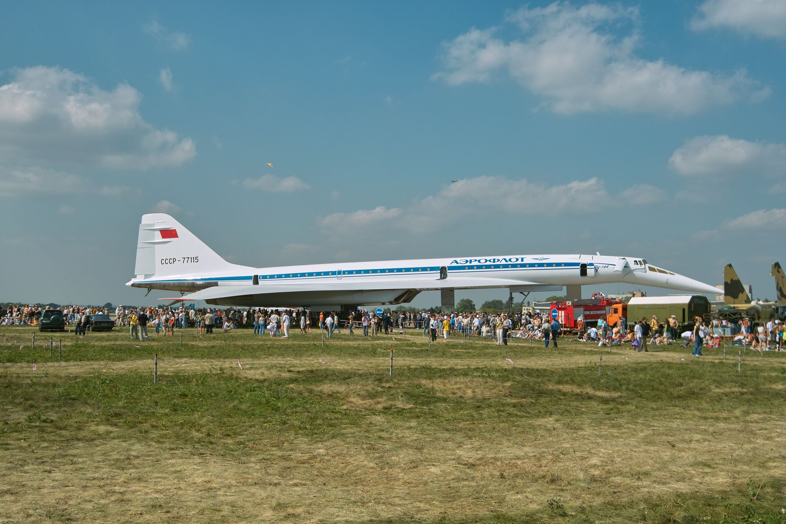 Ту-144Д, бортовой номер СССР-77115 на МАКС-2007